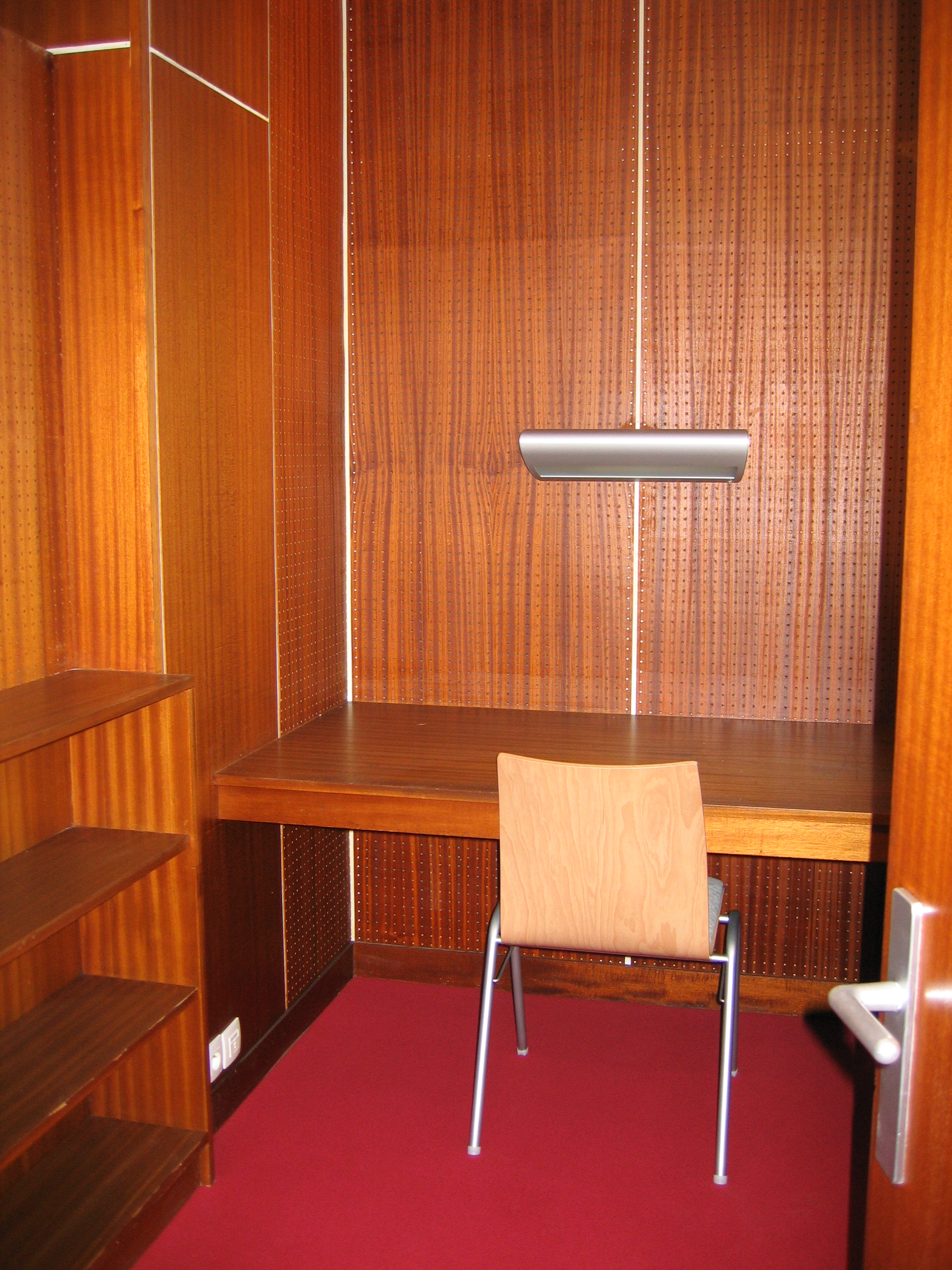 Carrel